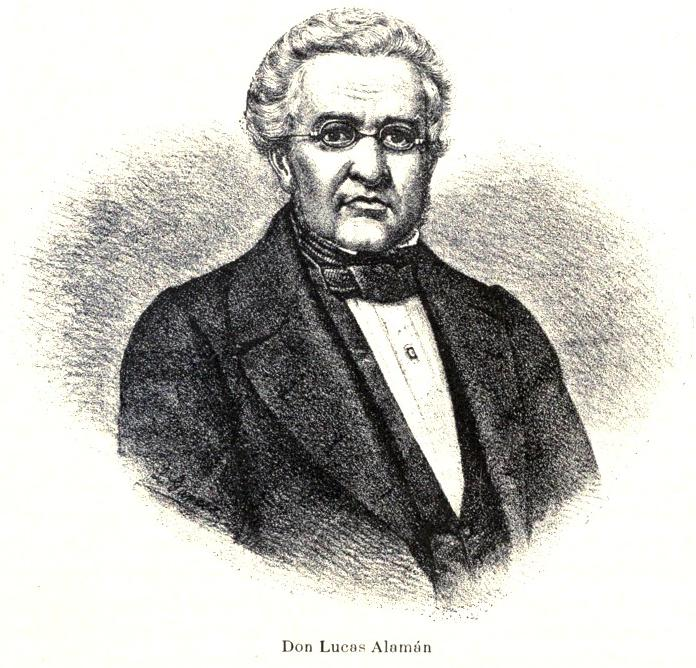 Imagen extraida del libro de Vicente Riva Palacio, Julio Zárate (1880) "México a través de los siglos" Tomo III: "La guerra de independencia" (1808 - 1821)